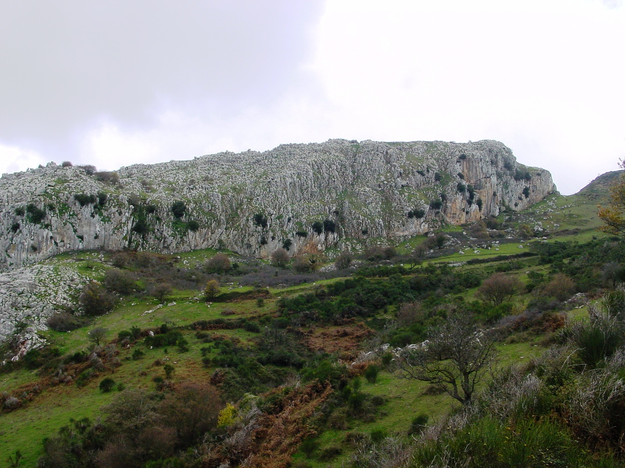 Parco dei Nebrodi, Sicily Rocche del Crasto